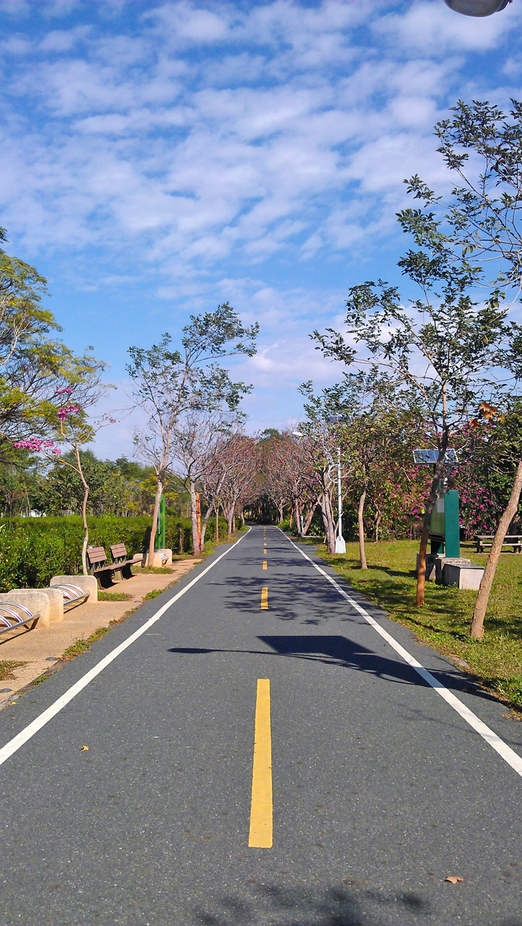 中文（台灣）: 潭雅神自行車道1